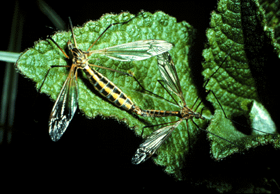 Some Tipulidae possibly (Ctenophora ornata) ?? --- nl: Langpootmug, mogelijk "Gele kamlangpootmug" (Ctenophora ornata) ?? de: Kammschnake?